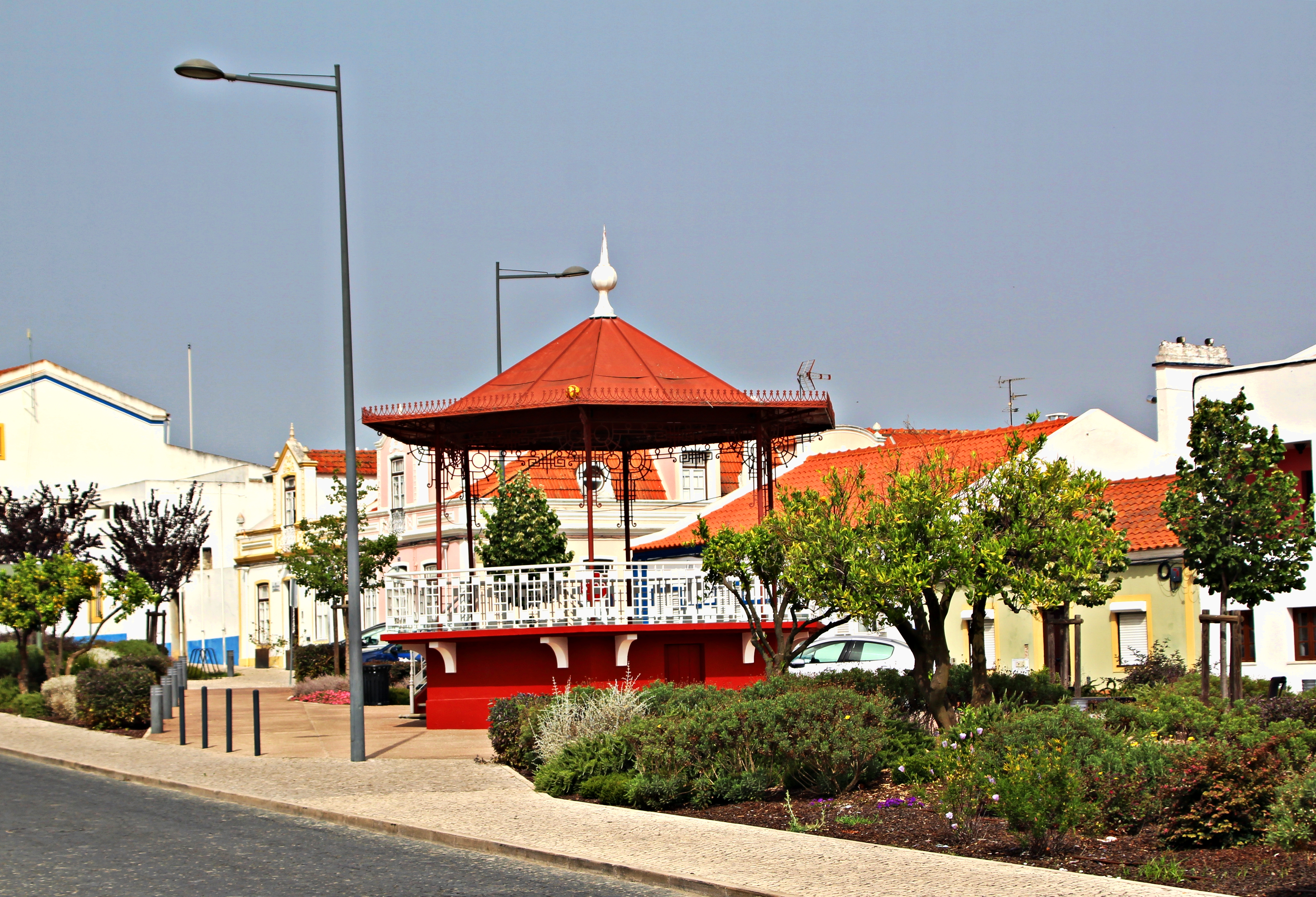 Plaza del Ayuntamiento en Grándola, el Algarve